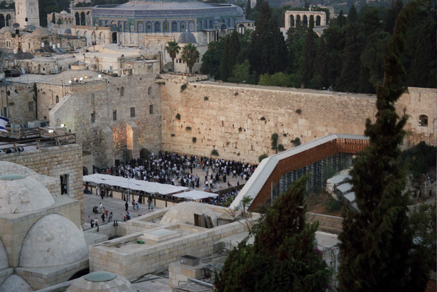 העיר העתיקה בירושלים (בערבית: بلدة القدس القديمة, נהגה: בִּלִדַת אֶלקוּדְס אֶלקָדִימָה) היא האזור העירוני העתיק של ירושלים. שטחה המוקף על ידי חומות ירושלים הוא כ-850 דונם.כמו כן נכללים בעיר העתיקה הר ציון ועיר דוד, הנמצאים מחוץ לחומות, בסמוך ומצד דרום. העיר העתיקה מהווה מוקד משיכה מרכזי לתיירים בני דתות ואומות שונות, אשר באים מרחבי העולם לבקר את האתרים הקדושים הנמצאים בה, ובהם: הר הבית, הכותל המערבי וכנסיית הקבר.